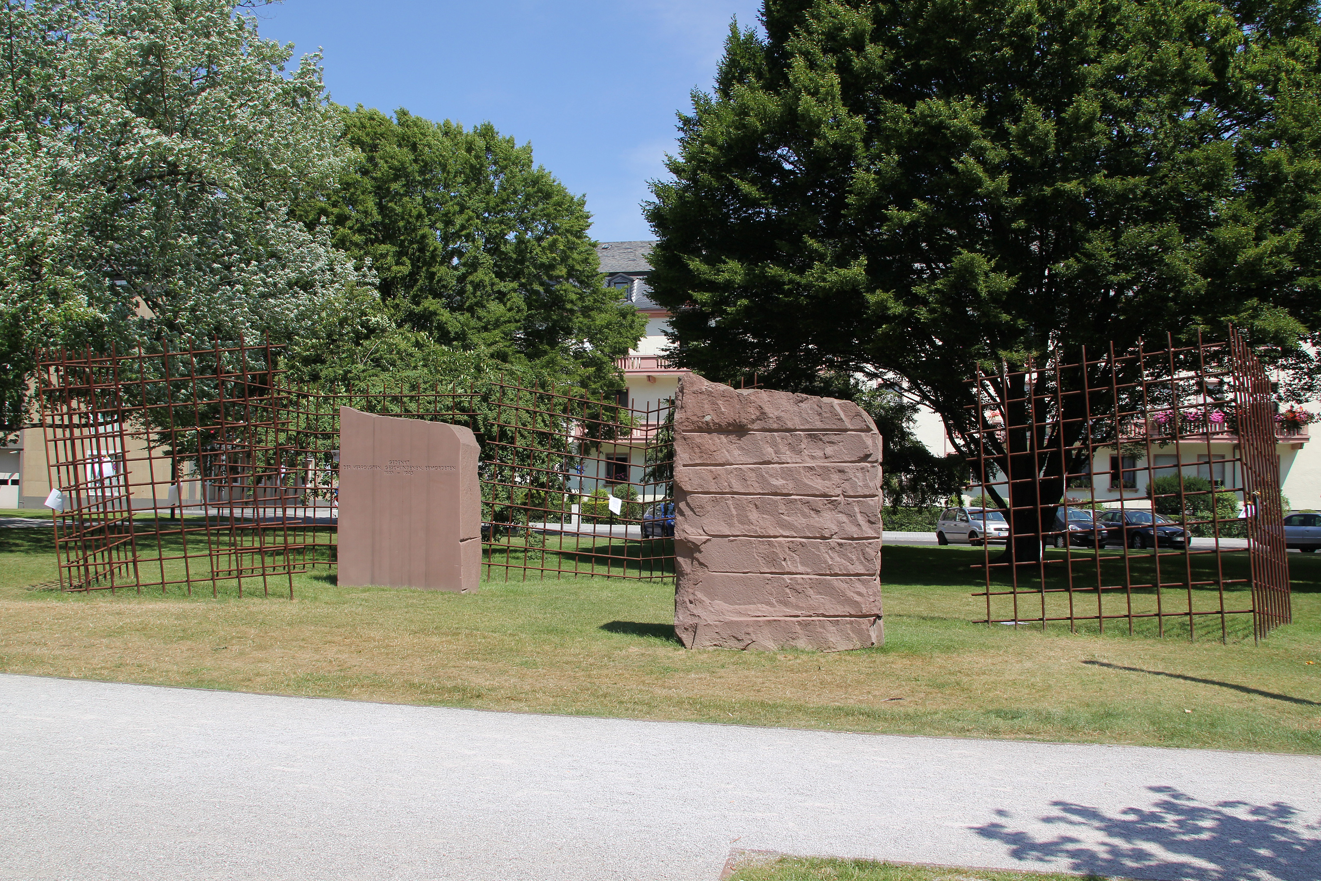 Koblenz im Buga-Jahr 2011 - Mahnmal für die Opfer des Nationalsozialismus in Koblenz